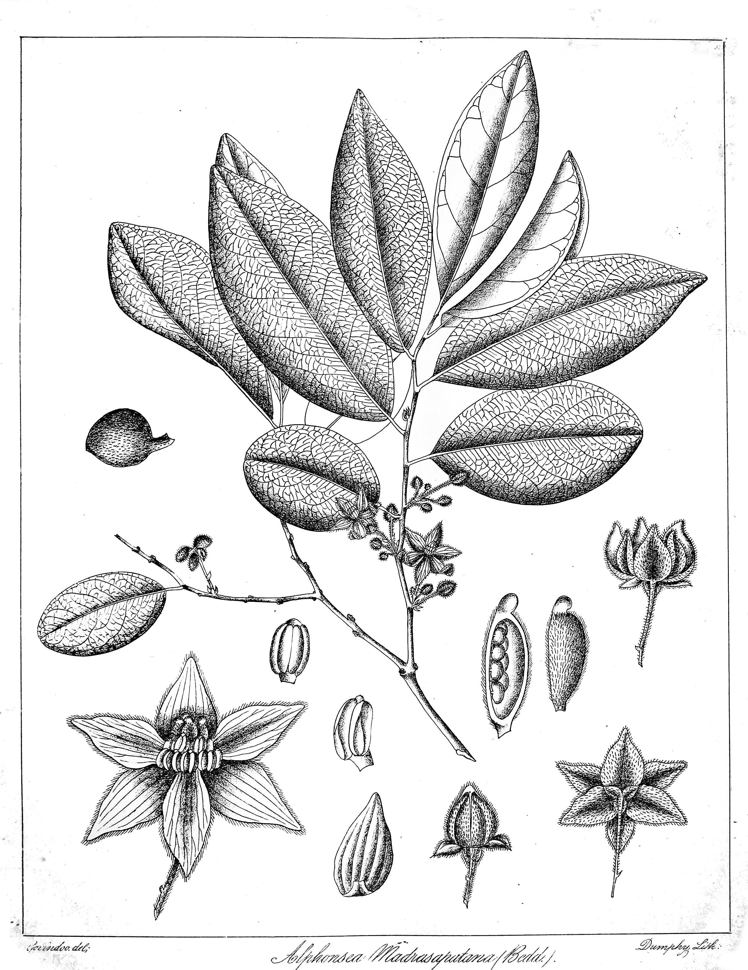 Alphonsea madraspatana